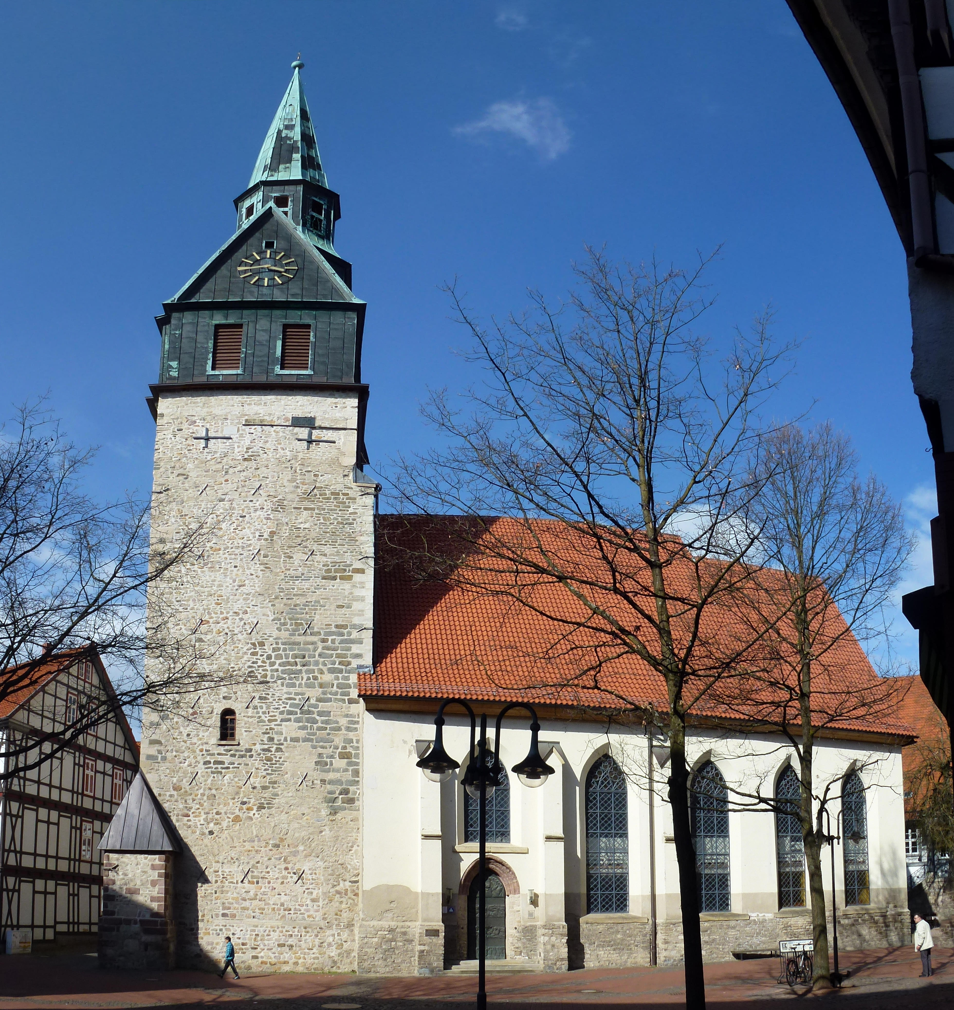 Marktkirche St. Aegidien in Osterode am Harz